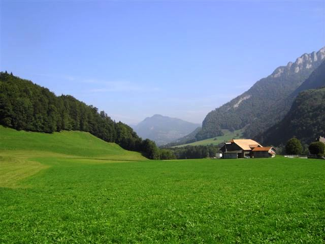 Bas-Intyamon FR, Suisse